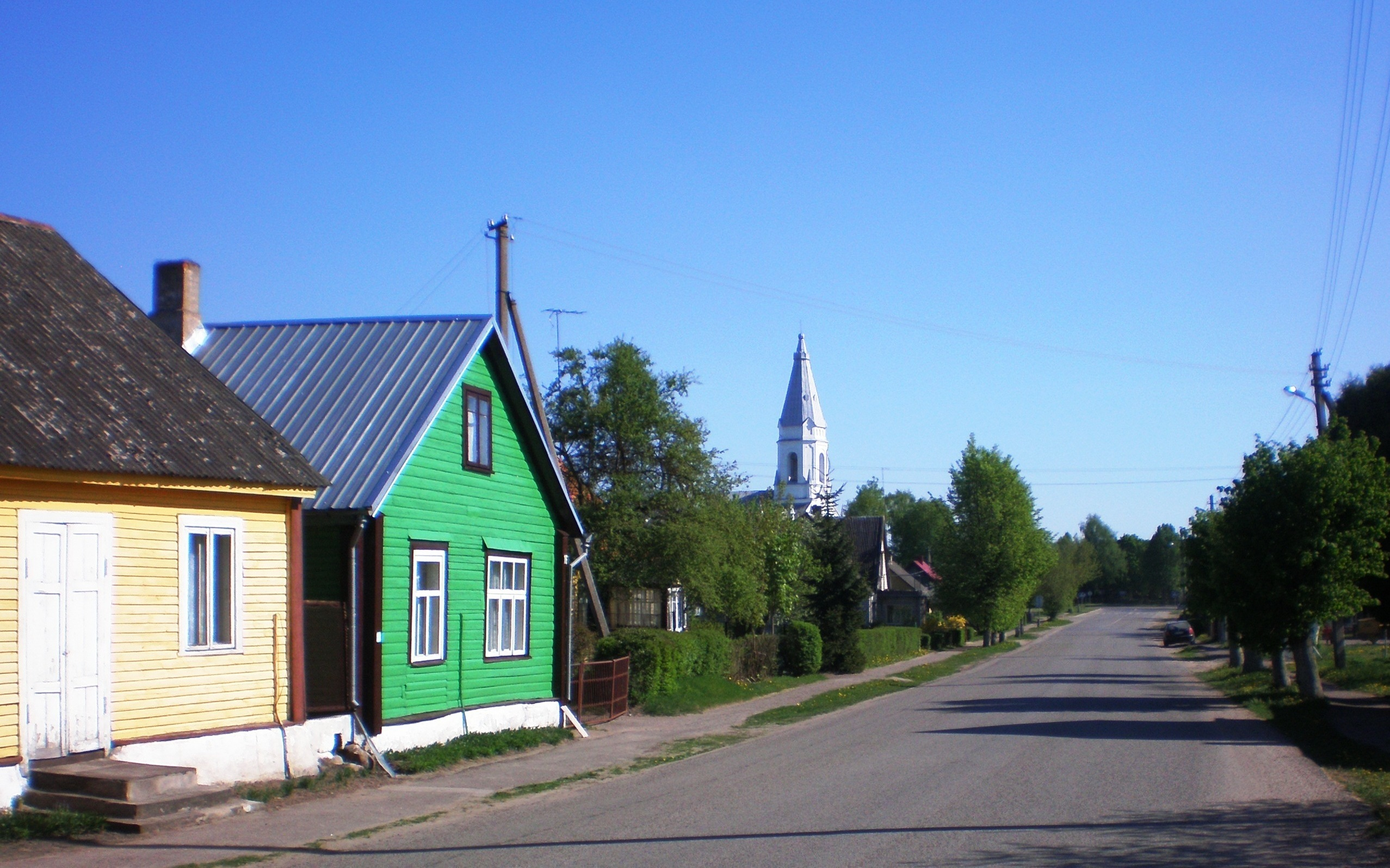 Šėta, Kėdainių raj.